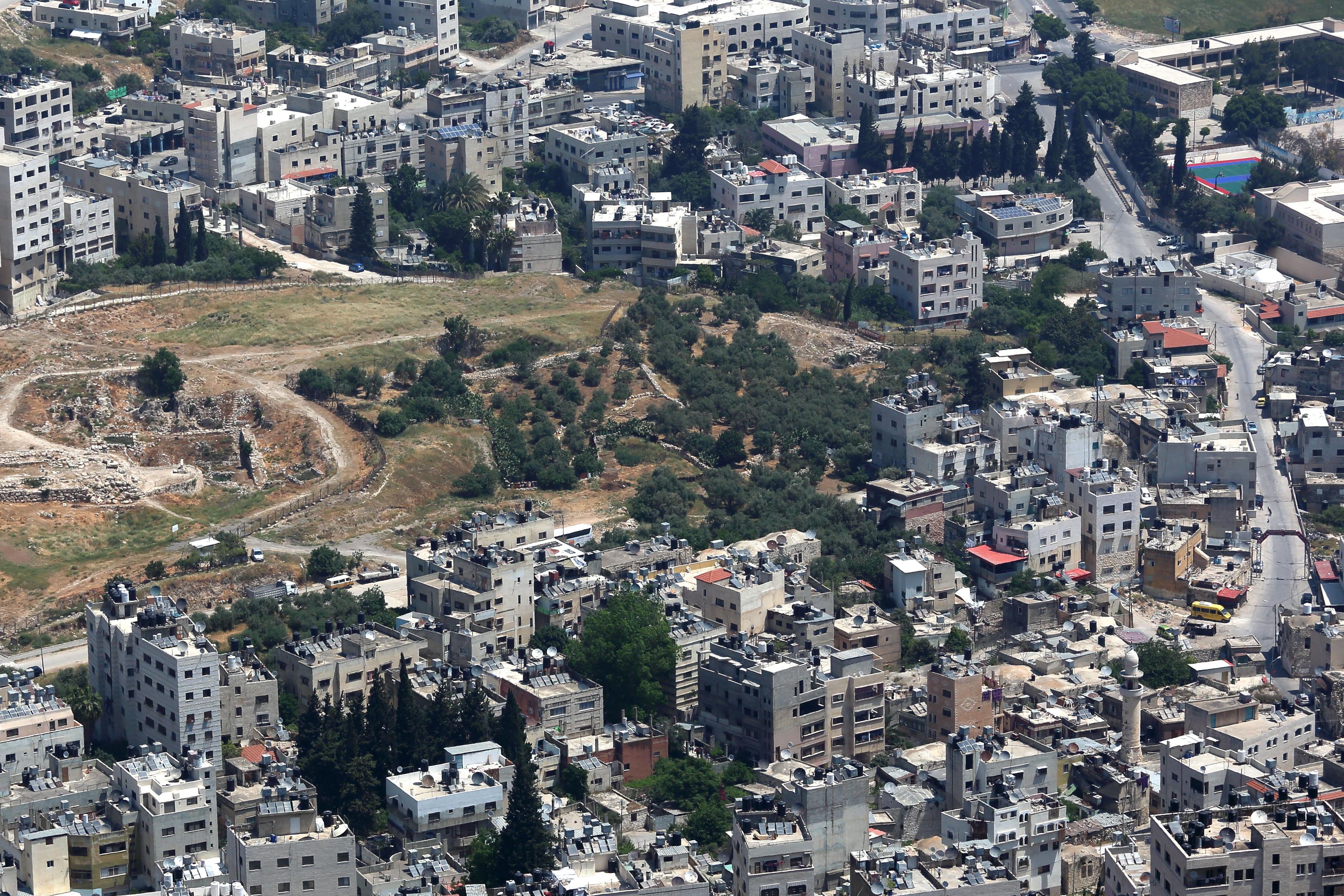 בצד שמאל ניתן לראות את שרידי חומת העיר שכם העתיקה, ואת האבן המיוחסת ל'אבן הגדולה' הנזכרת במעמד כריתת הברית בשכם. בצד ימין ניתן לראות את קבר יוסף (המבנה בעל הכיפה הלבנה).